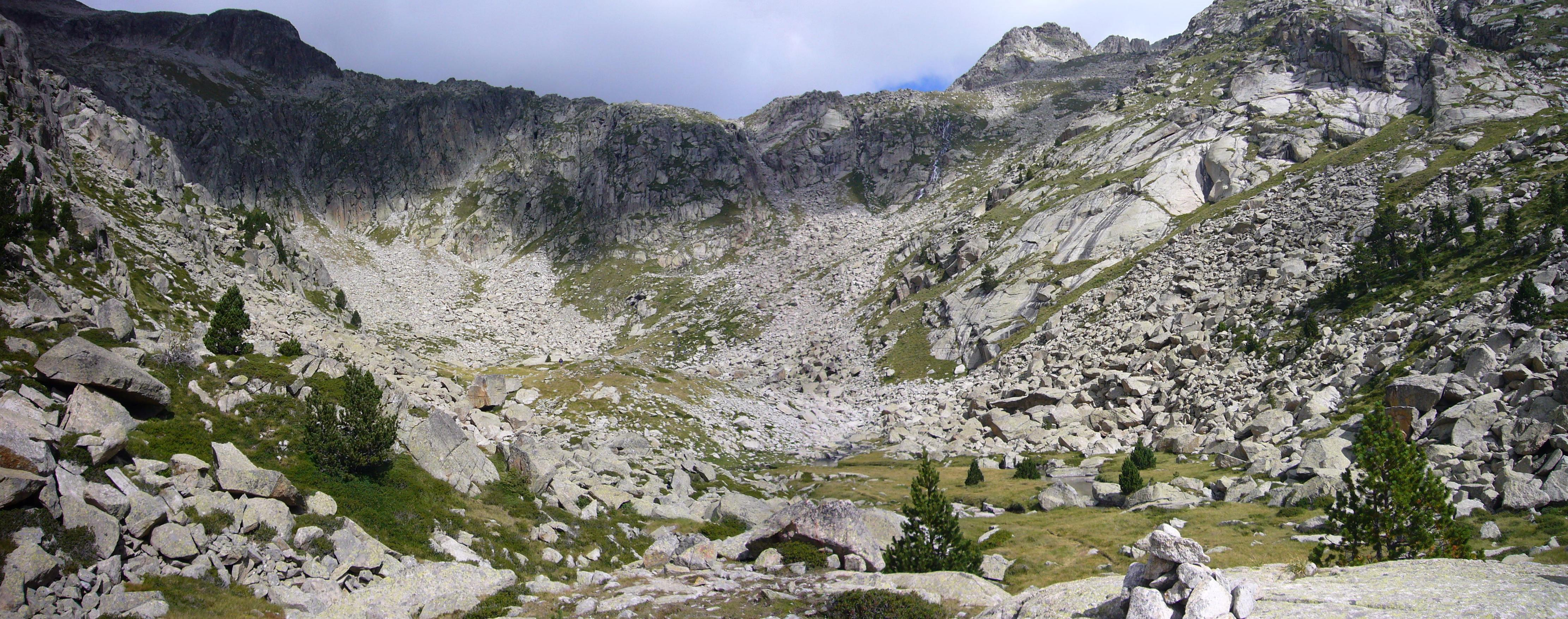 Vall de Contraix ; la Vall de Boí, Alta Ribagorça, Catalunya